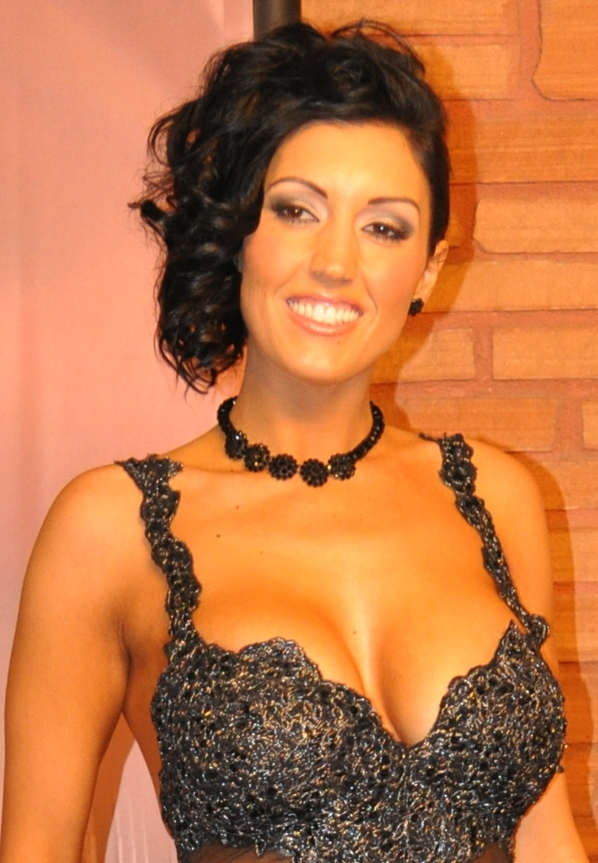 Dylan Ryder at AVN Awards 2011